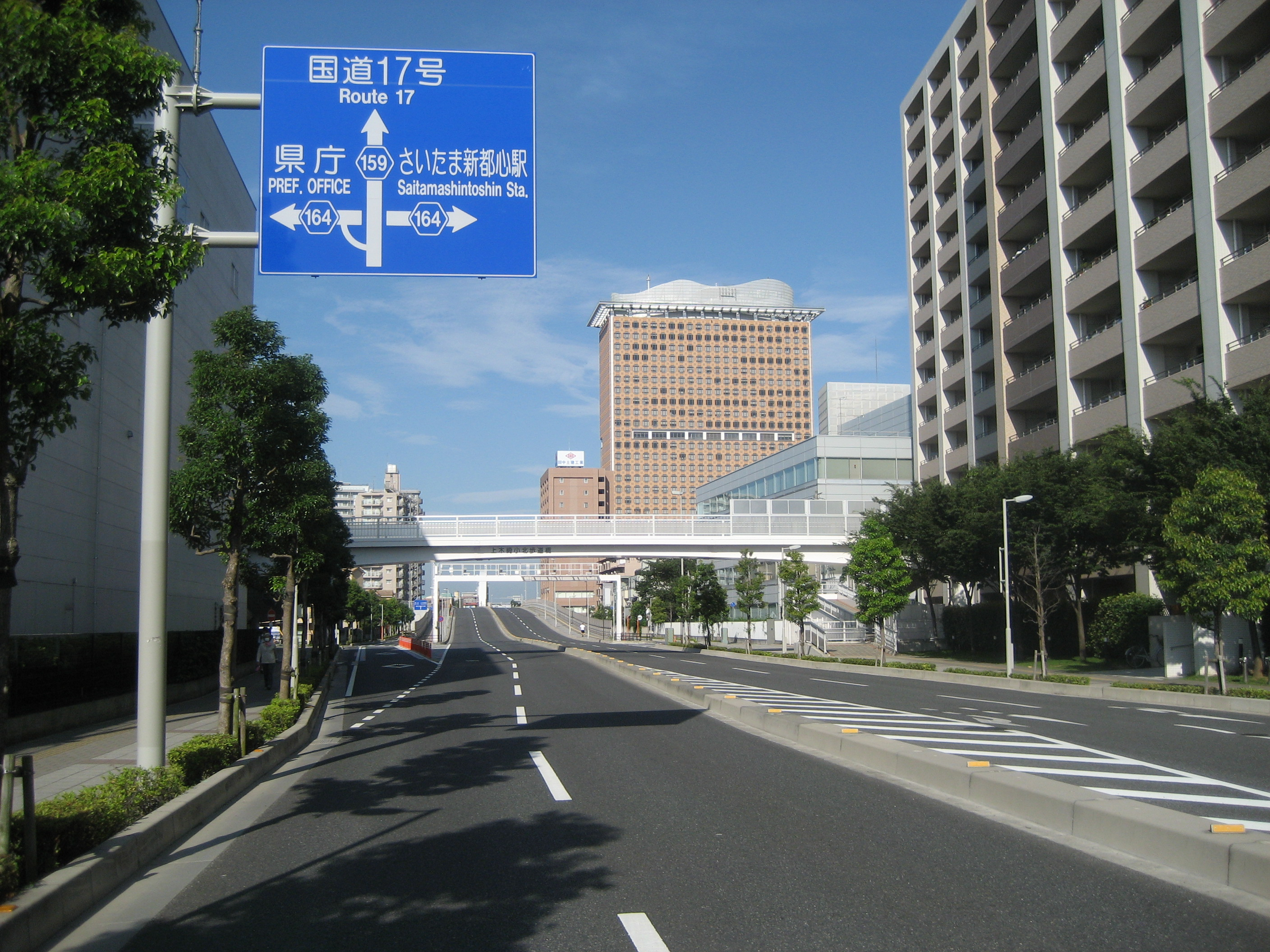 埼玉県道159号線浦和区上木崎三丁目付近（国道17号線方面を撮影）